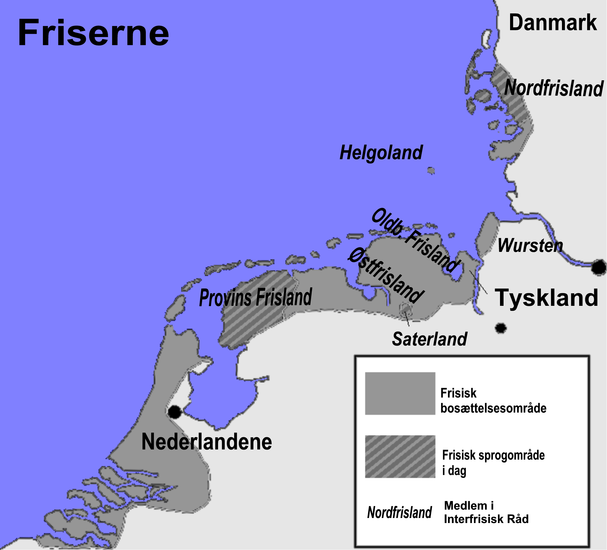 Frisisk bosættelsesområde og sprogområde i dag